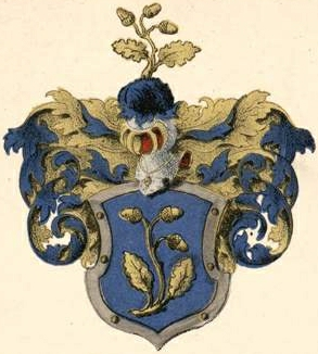 Wardenburgi suguvõsa aadlivapp